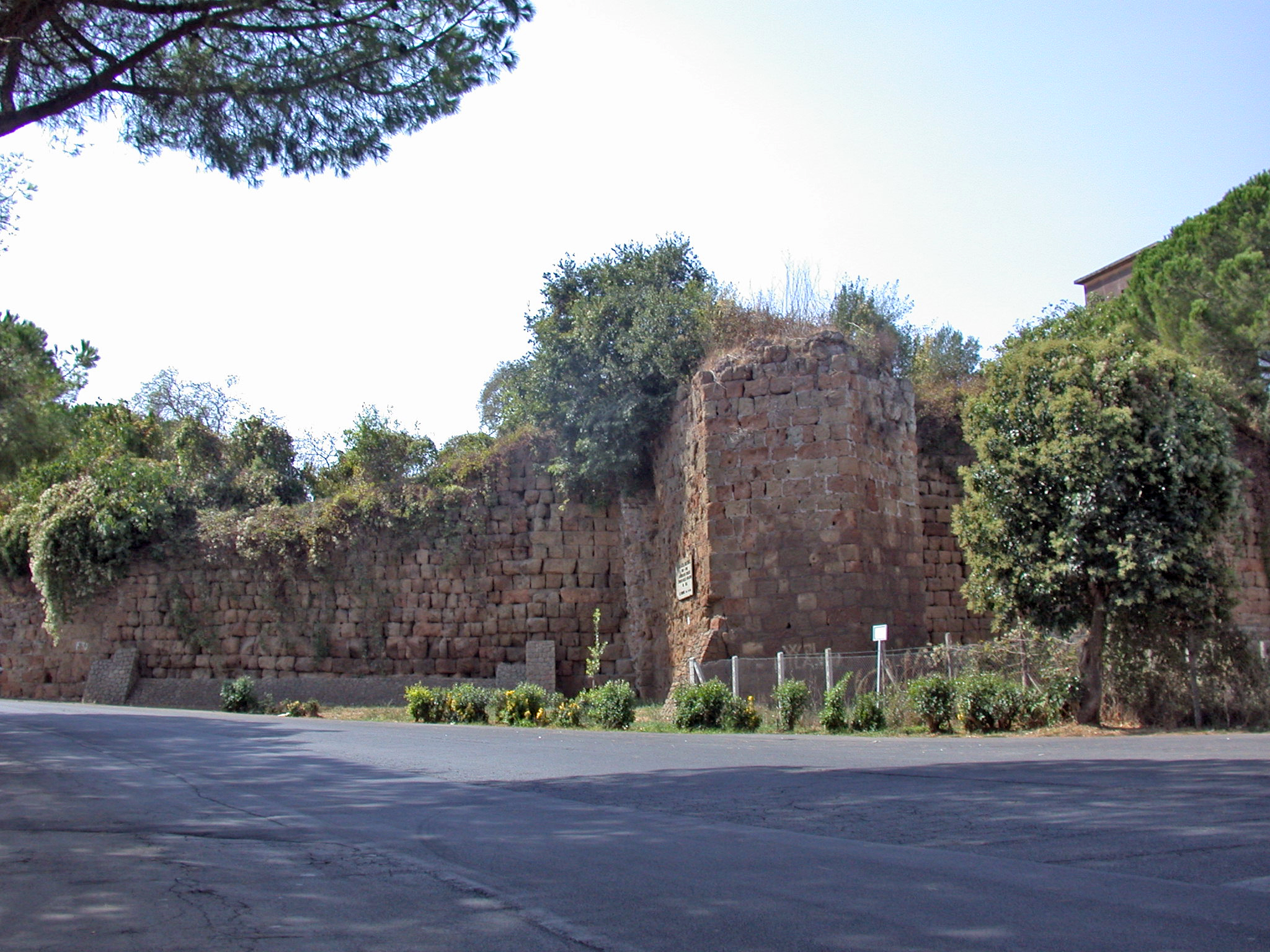 Italia, Lazio, provincia di Roma, Ardea: mura del IV secolo in opera quadrata sul lato orientale e torre medioevale